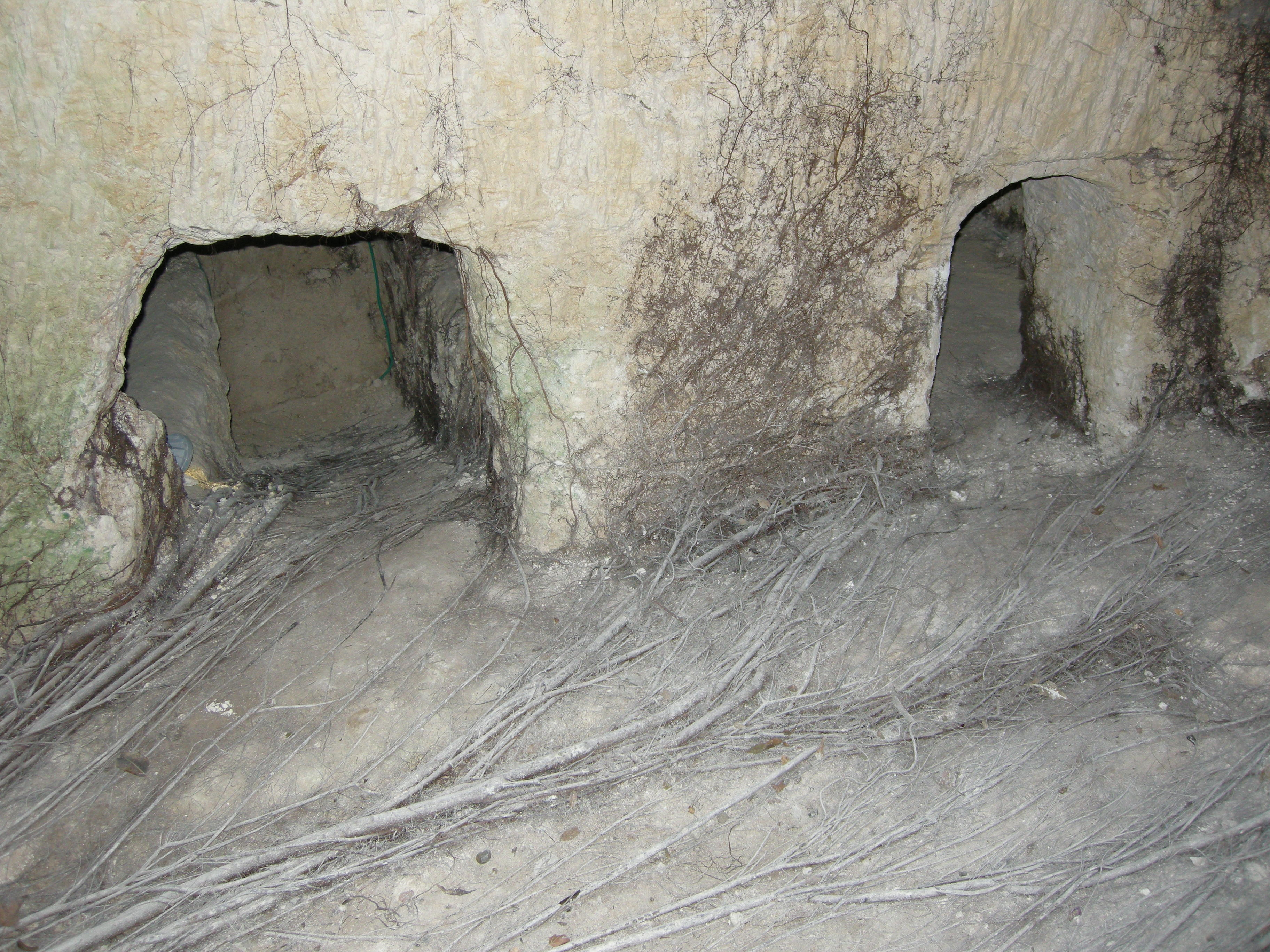 Nicanor cave